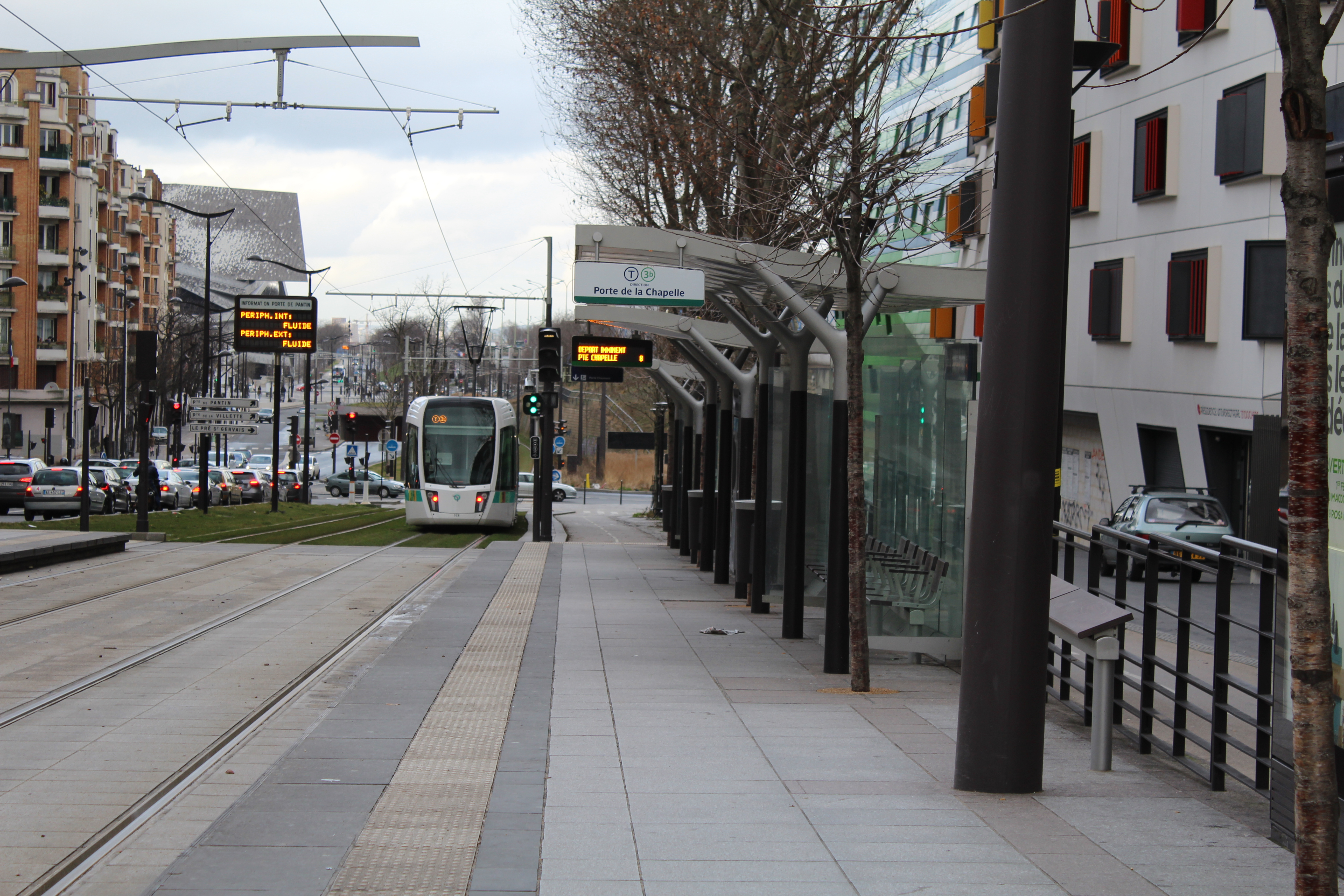 Station Butte du Chapeau Rouge sur la ligne 3b du tramway d'Île-de-France.